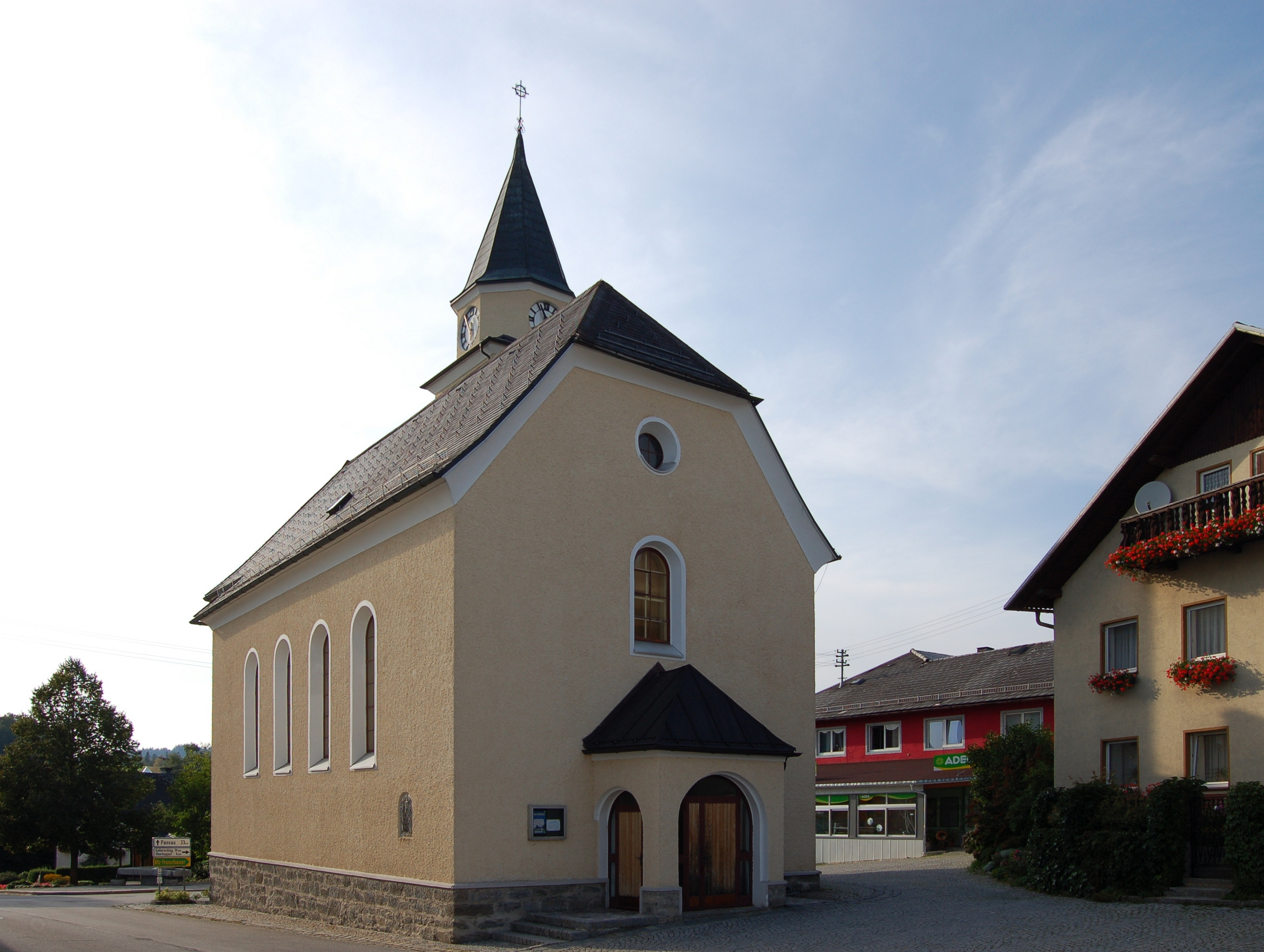 Die Kirche Maria Empfängnis in Neustift im Mühlkreis im Bezirk Rohrbach (Oberösterreich). Die Expositurkirche in Neustift wurde zwischen 1948 und 1950 an der Stelle einer 1869 errichteten Kapelle gebaut. Es handelt sich bei dem Neubau um einen schlichten, historisierenden Saalbau mit polygonalem Chor, Walmdach und markantem Turm. Die Einrichtung stammt großteils aus der Zeit um 1950.